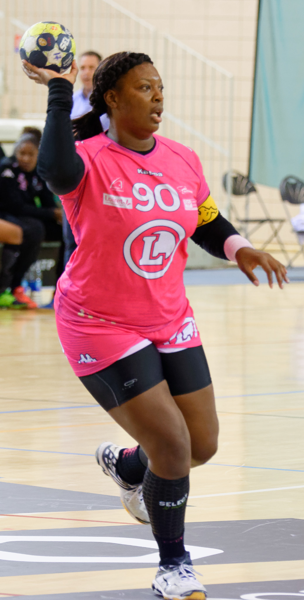 Laura Kamdop lors de la rencontre Issy Paris / Fleury. Le 03 septembre 2017 à Issy Les Moulineaux.